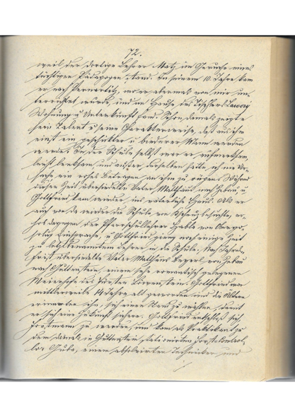 Mia Beyel